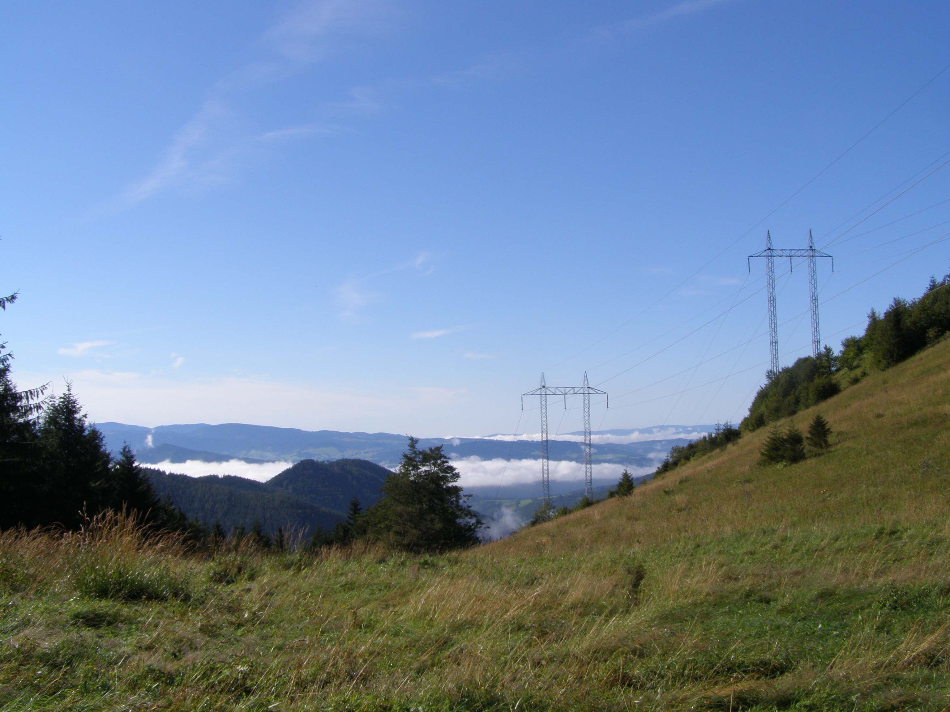 Hiadeľské sedlo na rozhraní Starohorských vrchů (Kozí chrbát, 1330 m) a Nízkých Tater (Prašivá, 1652 m); ranní pohled na jihovýchod (Slovenské rudohoří)